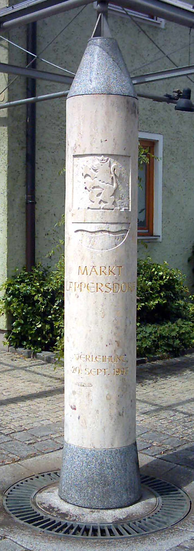 Lappersdorf, Bayern: Denkmal zur Markterhebung 1997 Bildautor: Luestling 11:16, 23. Mai 2005 (CEST) - Mail an [1] erbeten! Legende: (Aktuell) = dies ist das aktuelle Bild, (Löschen) = lösche diese alte Version, (Zurücksetzen) = verwende wieder diese alte Version. (Löschen) (Aktuell) 10:16, 23. Mai 2005 . . Benutzer:Luestling Luestling ( Benutzer_Diskussion:Luestling Diskussion) . . Bild:190505 lappersdorf-denkmal-markterhebung 1-380x1075.jpg